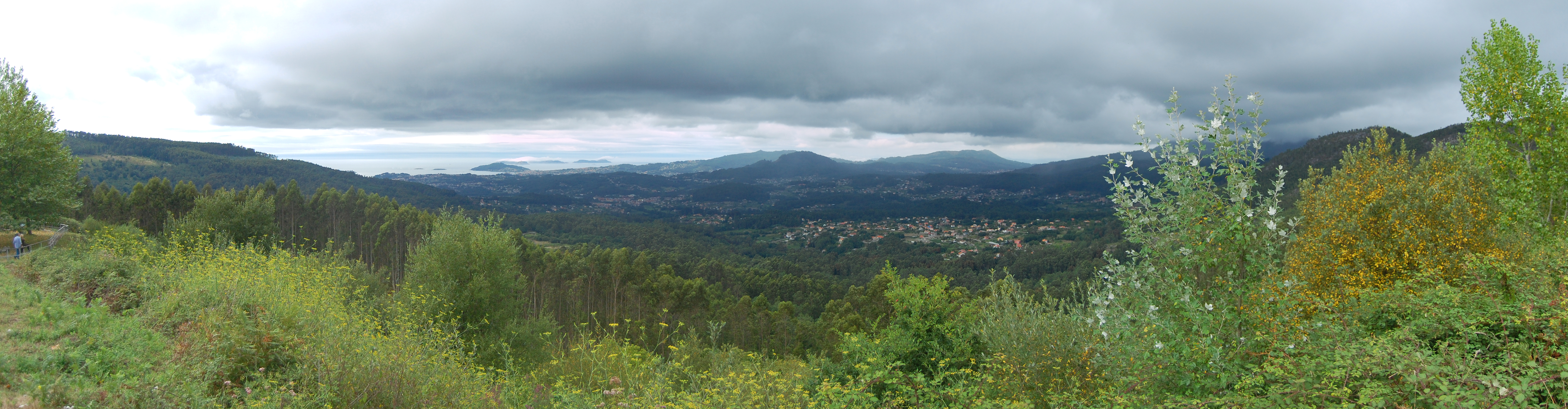 Vista dende o Monte Aloia. Poden apreciarse as illas Estelas e Cíes. Os tres lugares pertencen ós seus respectivos Lugares de Importancia Comunitaria. This is a photography of a Special Area of Conservation in Spain with the ID: ES1140005. Natura2000 entry, EEA entry This is a photography of a Special Area of Conservation in Spain with the ID: ES0000001. Natura2000 entry, EEA entry This is a photography of a Special Area of Conservation in Spain with the ID: ES1140012. Natura2000 entry, EEA entry